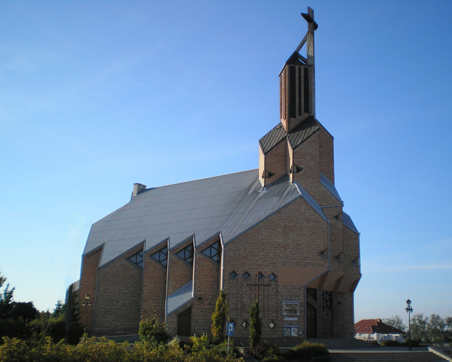 Parafia rzymskokatolicka p.w. Świętego Piotra Apostoła.